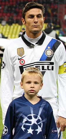 Javier Zanetti subito prima di CSKA Mosca-Inter 2-3